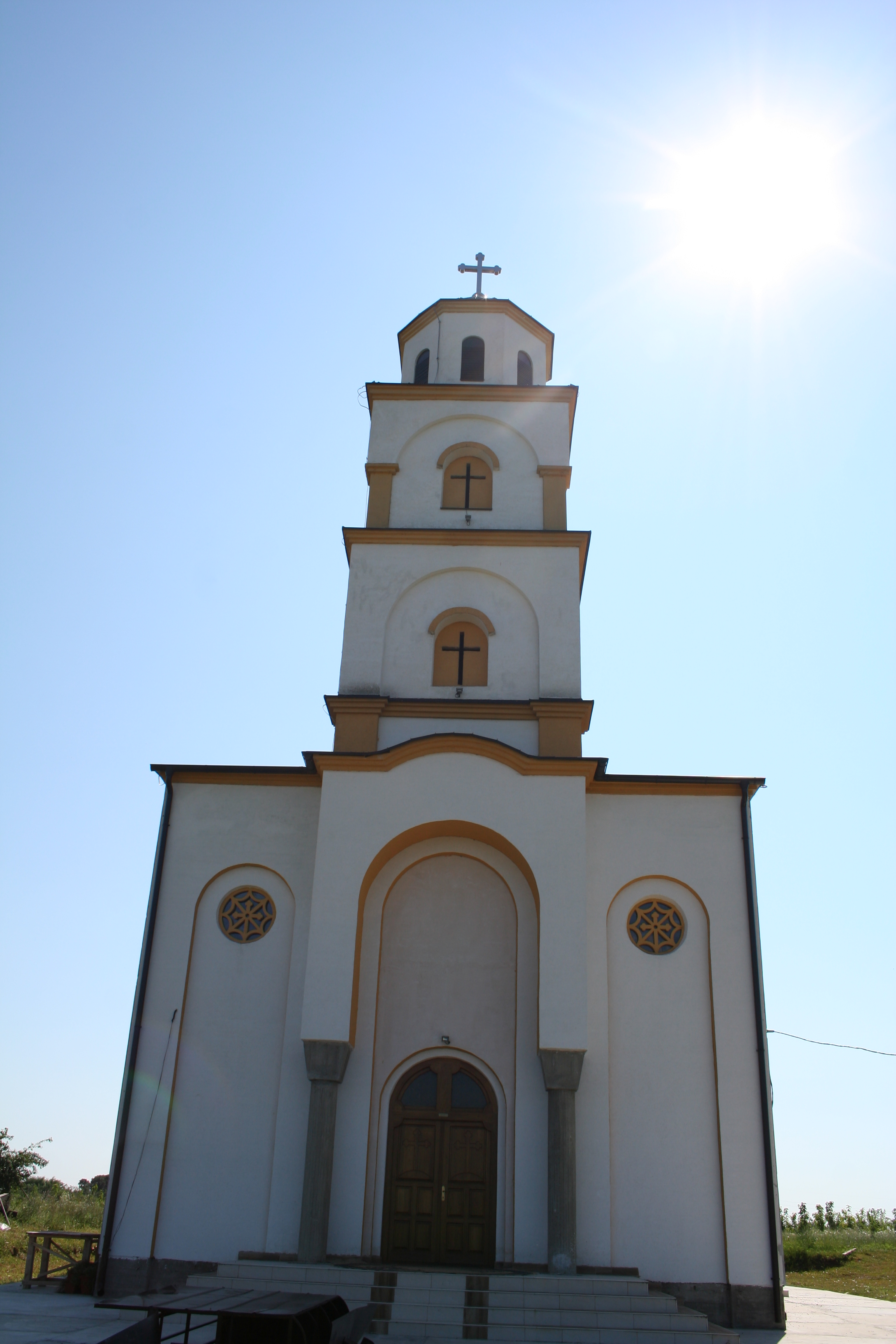 Crkva Vaskrsenja Gospodnjeg, Mišar